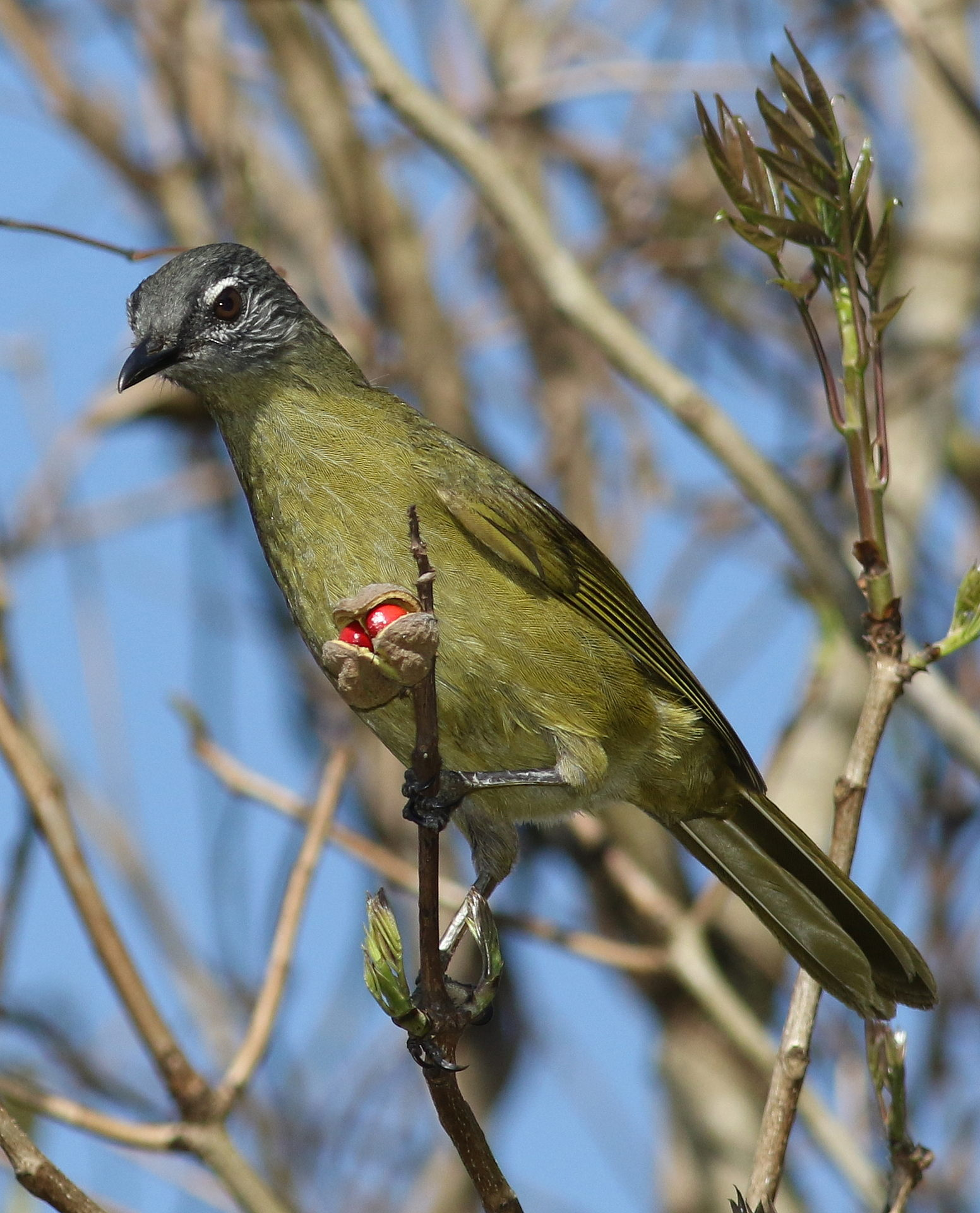 Stripe-cheeked greenbul, Arizelocichla milanjensis, at Seldomseen, Vumba, Zimbabwe